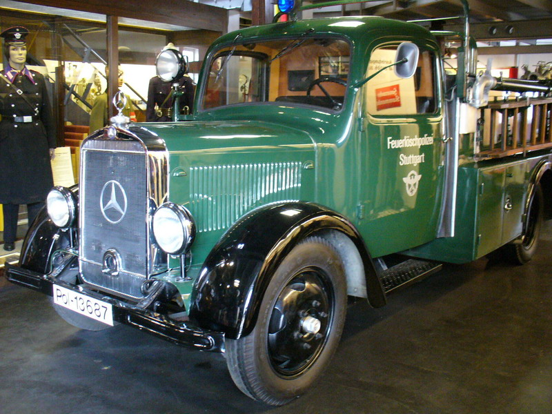 Winnenden Feuerwehrmuseum Feuerloeschpolizei Stuttgart